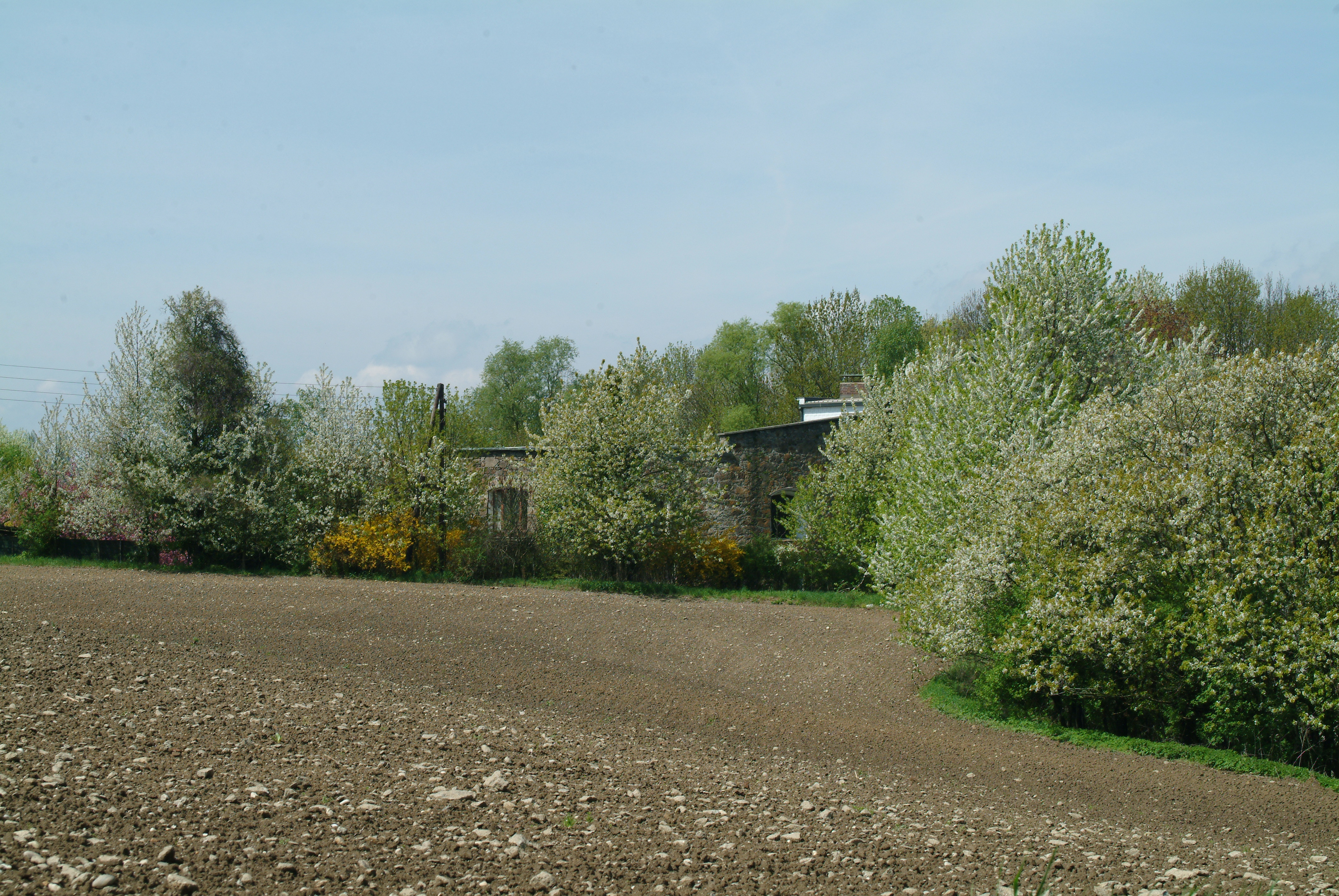 Turm 10 der Linzer Turmlinie